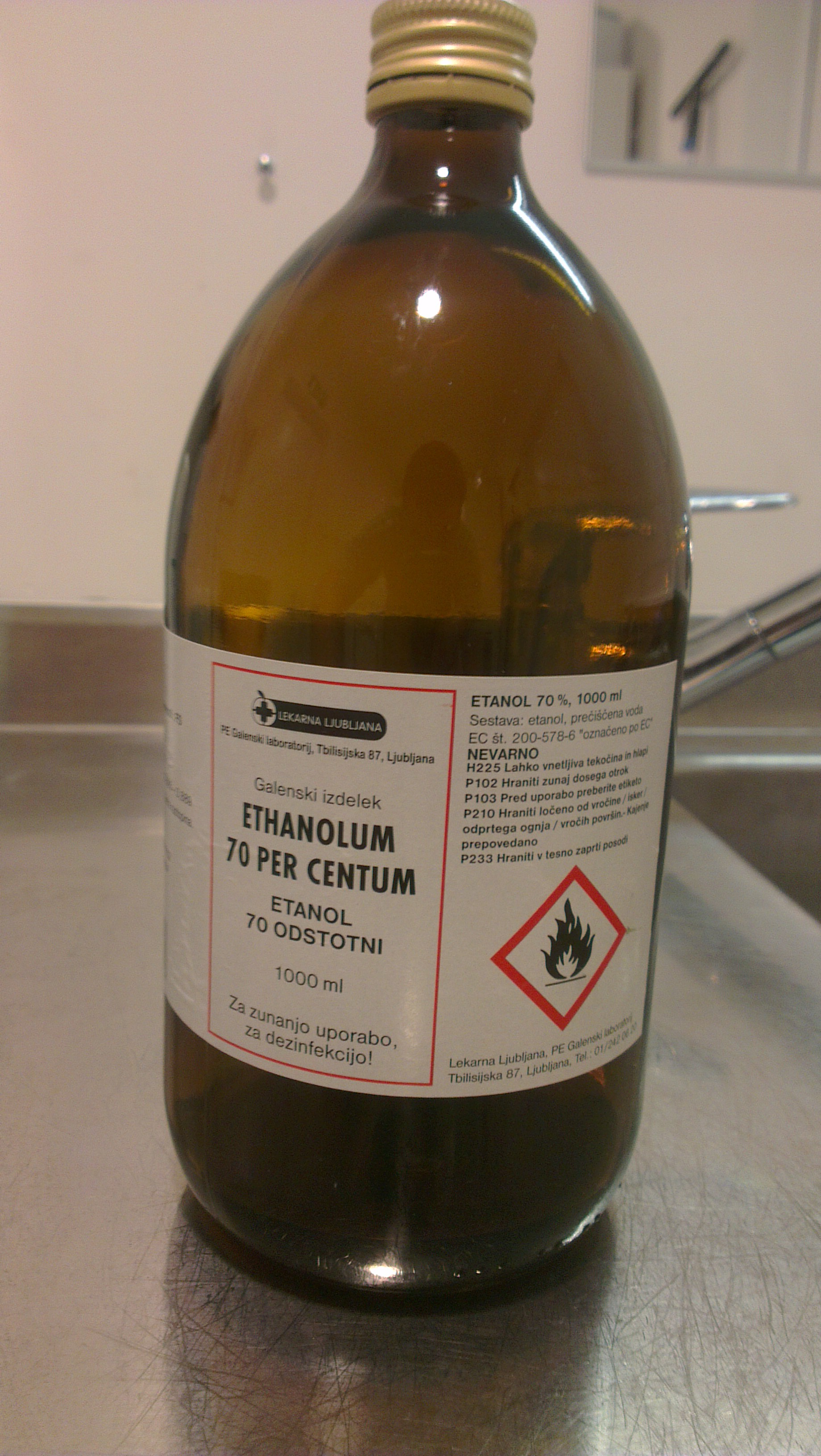 Na sliki je prikazana alkoholna raztopina. Lastna slika